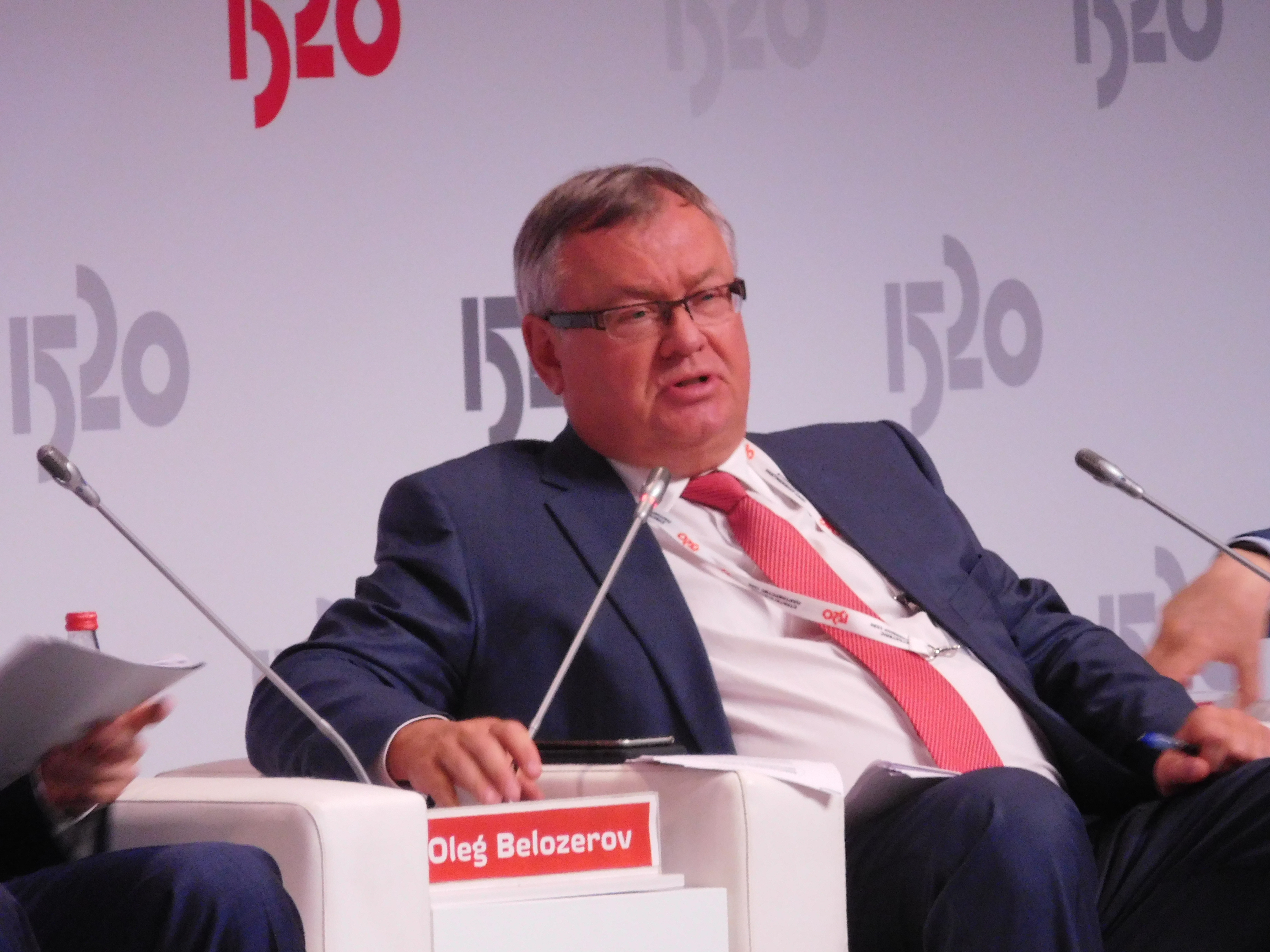 Глава ВТБ Андрей Костин полемизирует на мировом железнодорожном форуме 1520 в Сочи